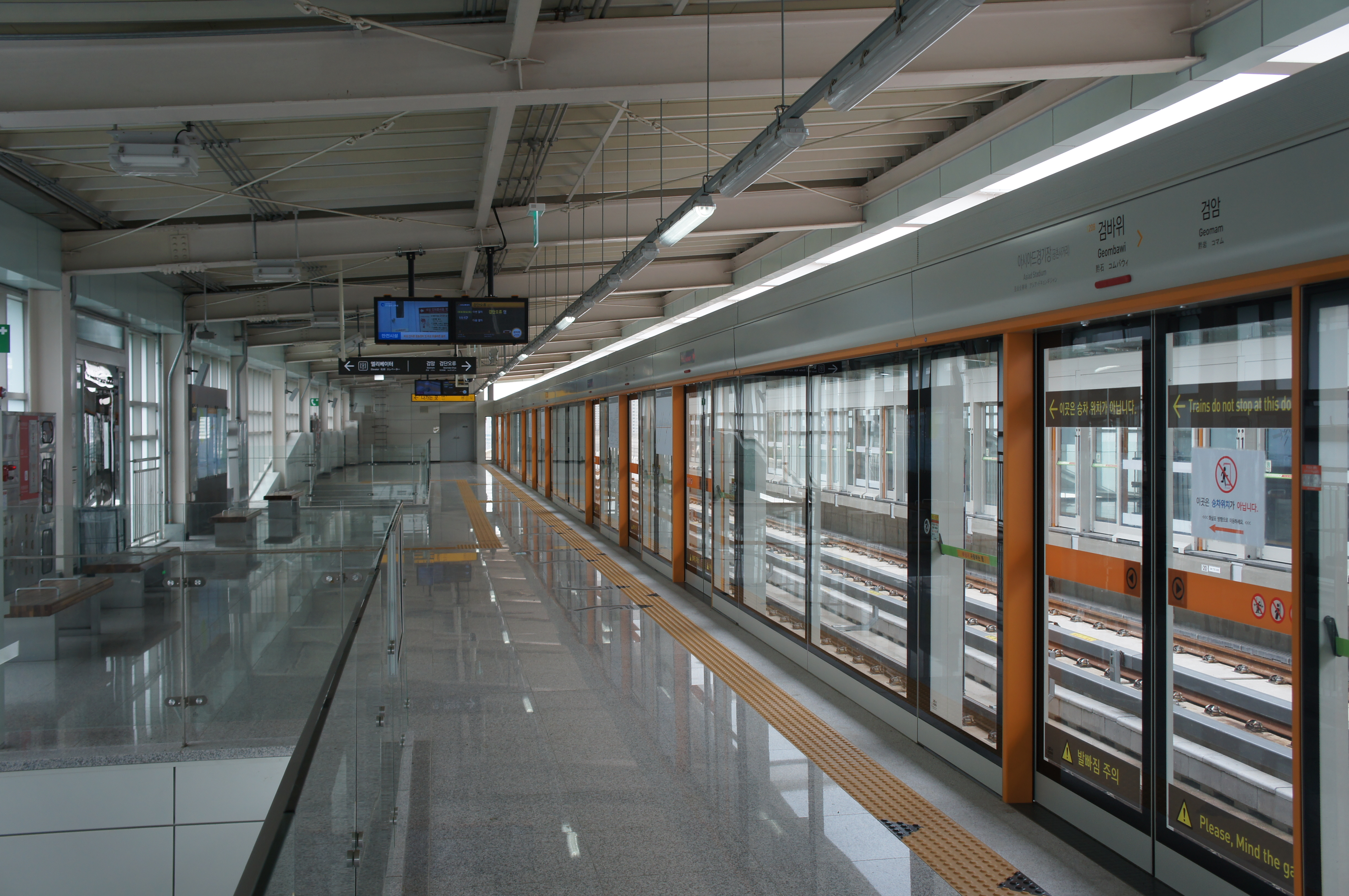 검바위역 승강장